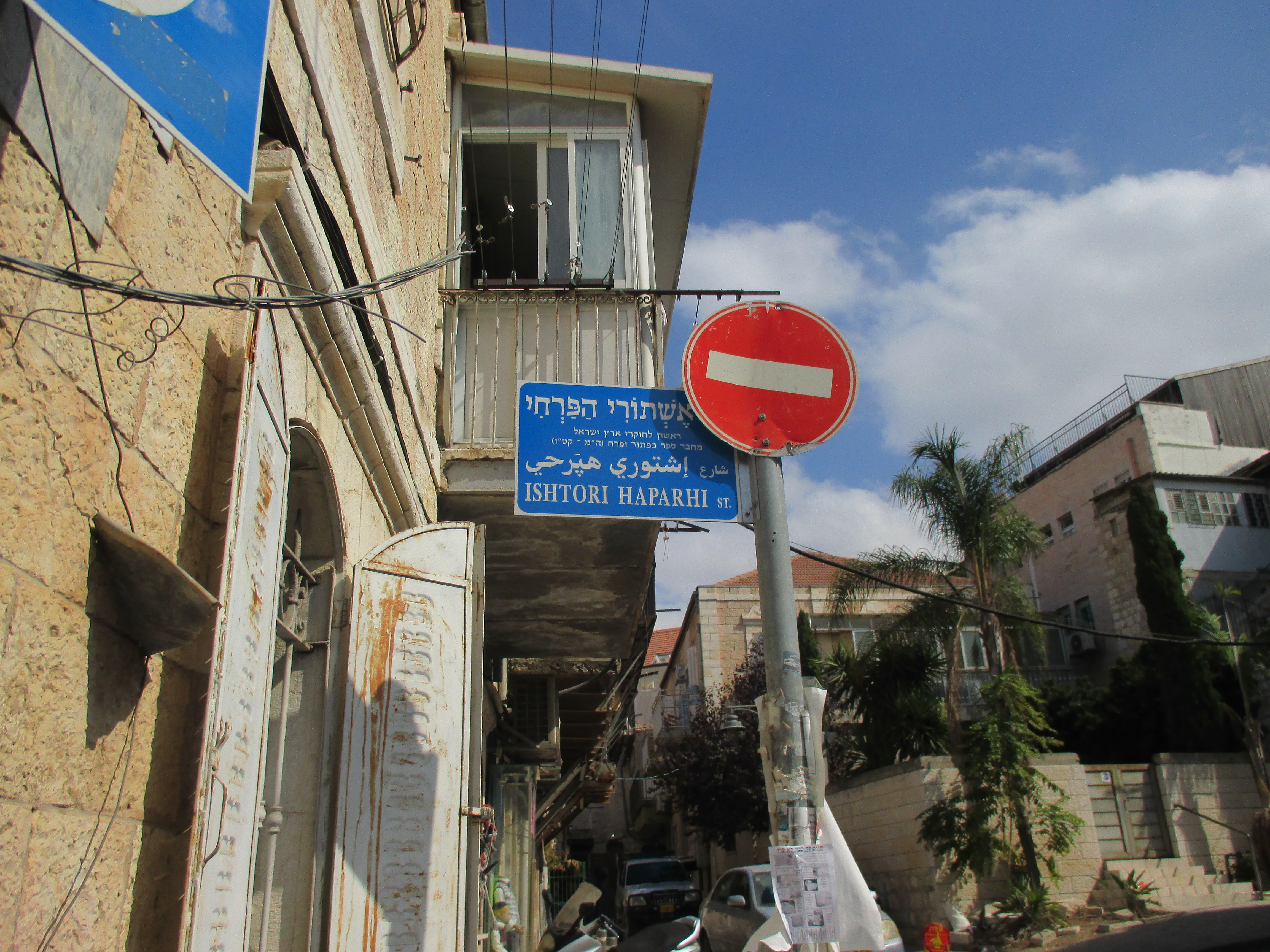 שלט רחוב בירושלים על שם אשתורי הפרחי